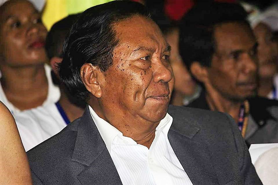 Abílio Araújo auf dem ersten Nationalkongress der PLP